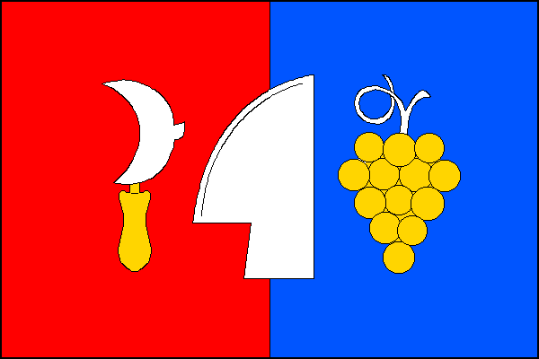 vlajka, Jezeřany Maršovice, okres Znojmo